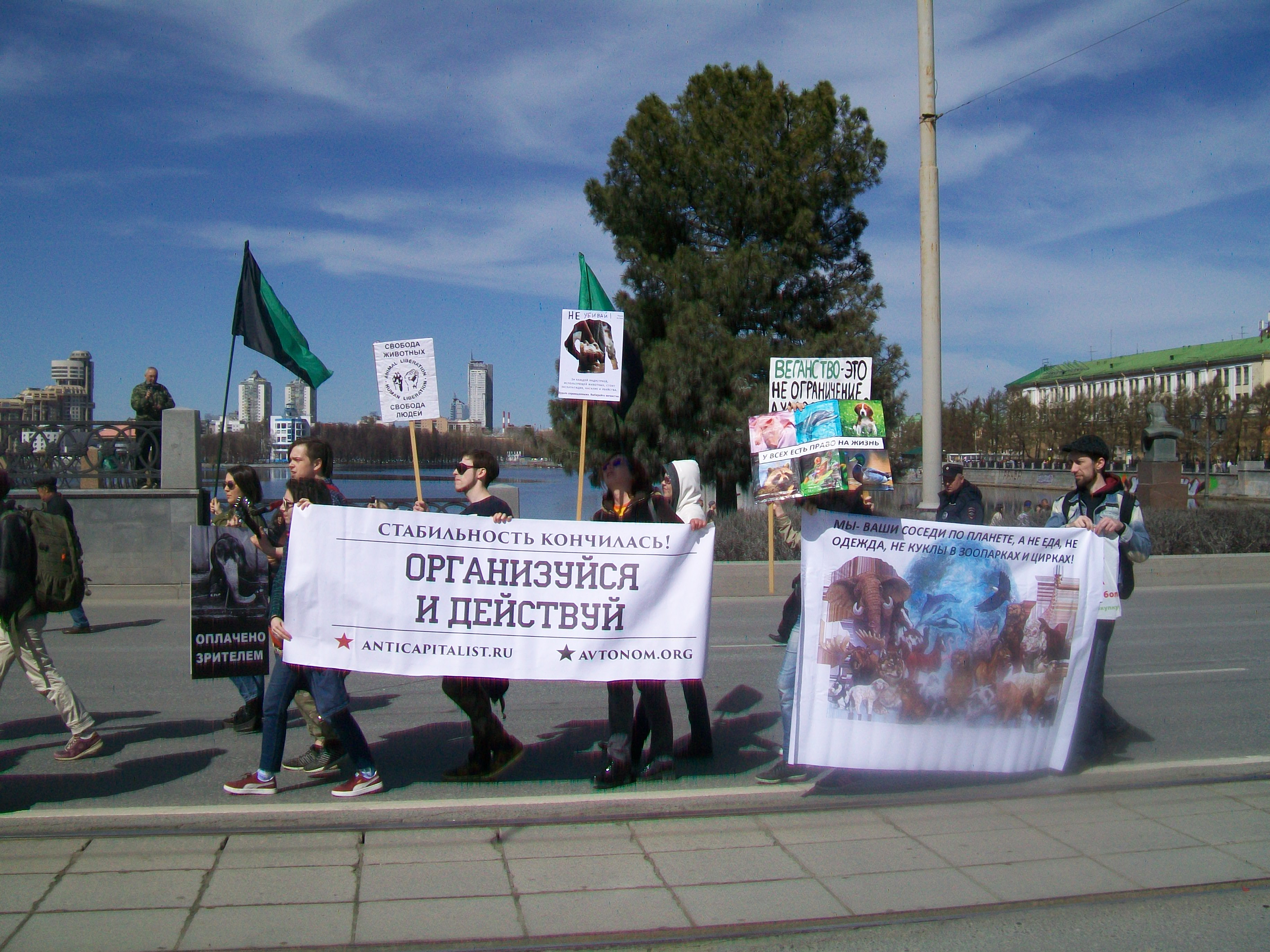 Зоозащитники на Первомае в Екатеринбурге. 1 мая 2017 года